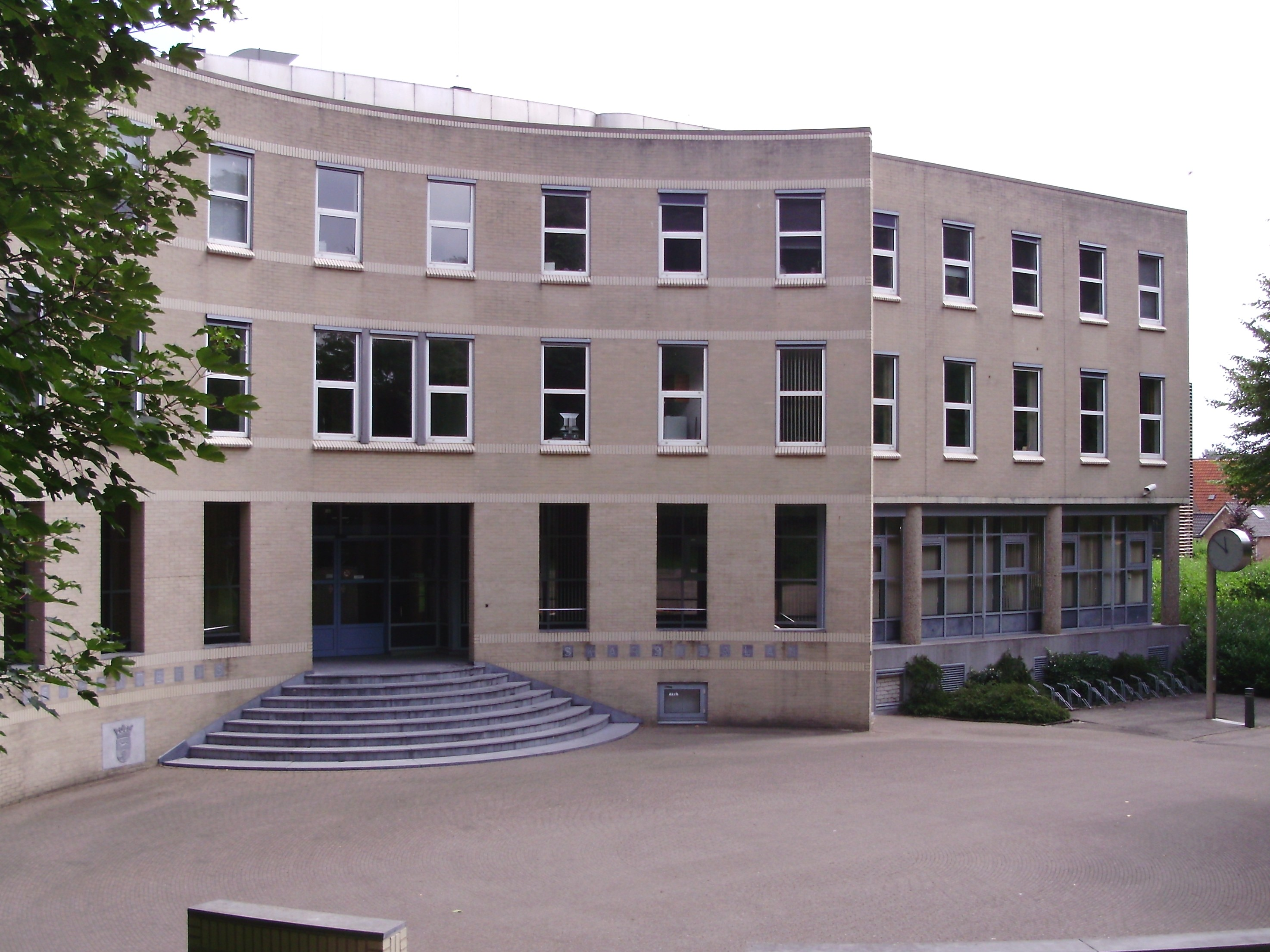 Gemeentehuis van Skarsterlân in Joure (provincie Friesland, Nederland)